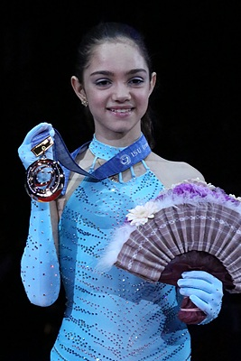 Евгения Медведева на Финале Гран При 2013 - Подиум